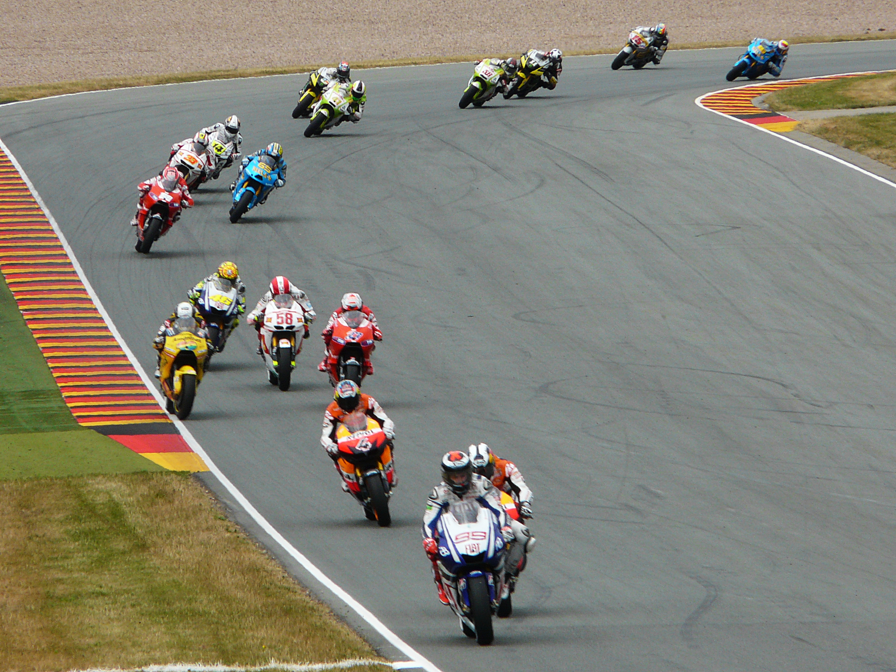 MotoGP-Starterfeld passiert Kurve 13 (Sachsen Kurve)